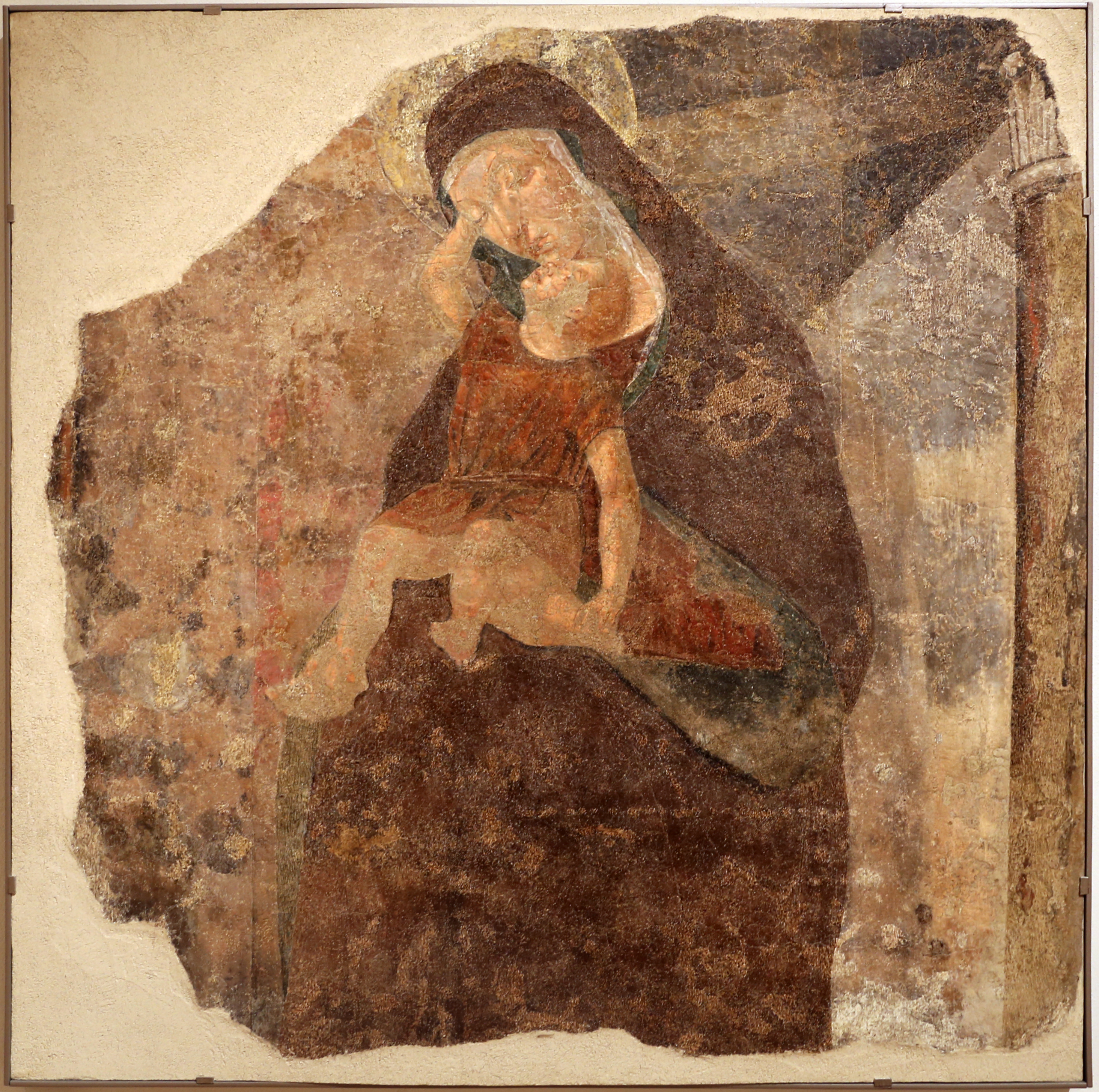 chiesa di San Giacomo Apostolo dei Domenicani This is a photo of a monument which is part of cultural heritage of Italy.